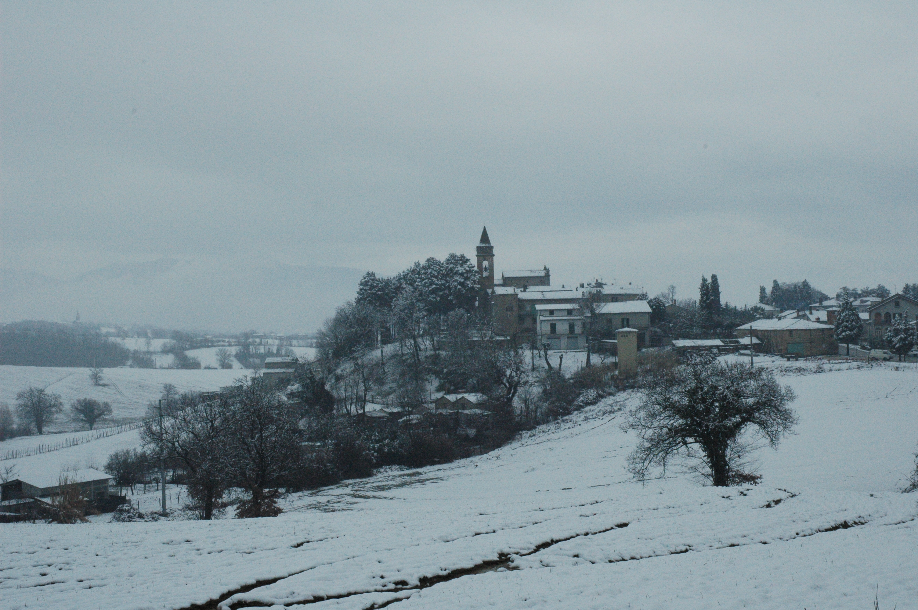 Veduta del castello di Farnetta innevato